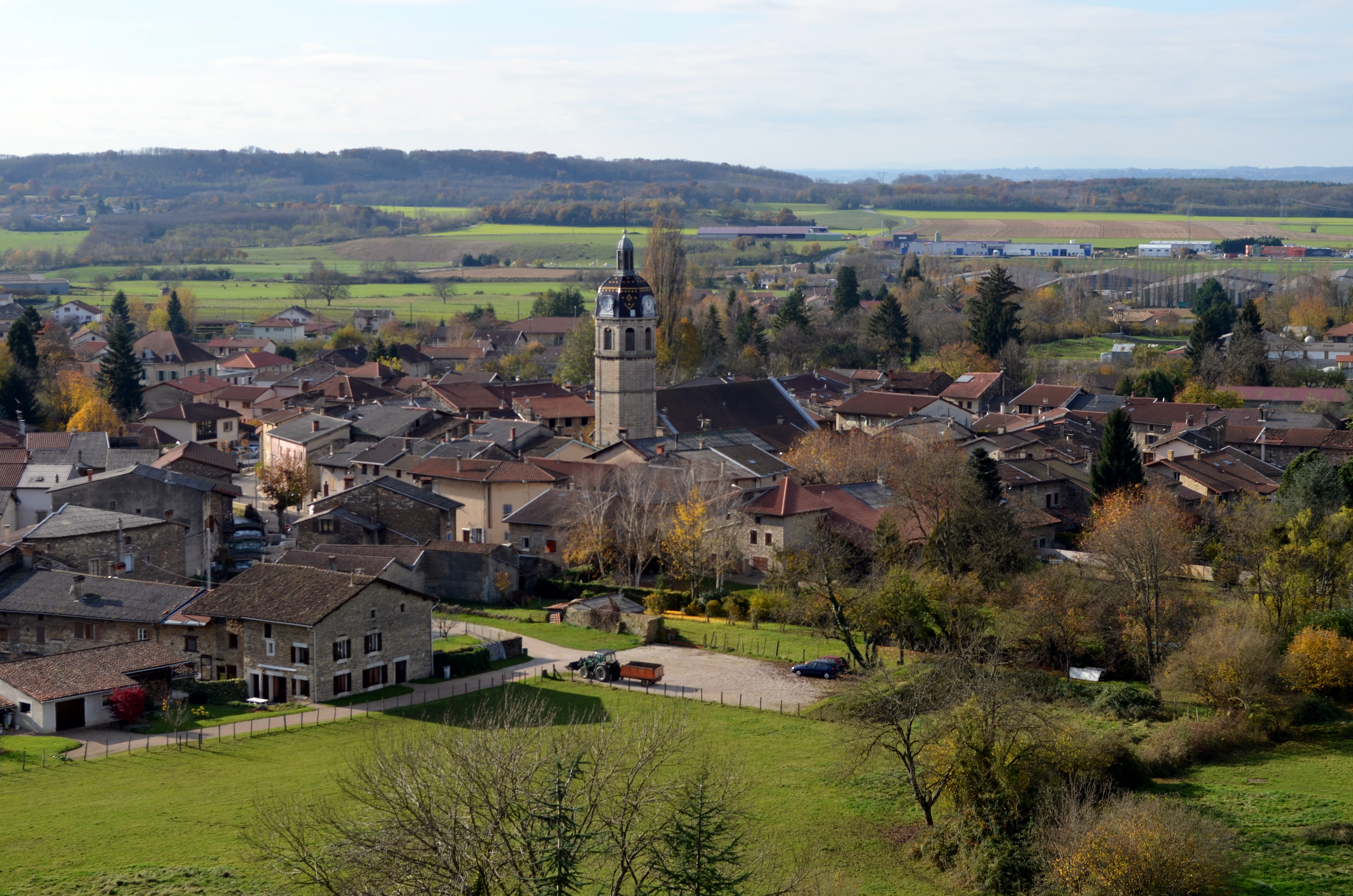 Photographie de Vaux-en-Bugey, Ain, France.